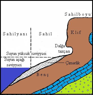 Sahillin morfoloji elementlırə